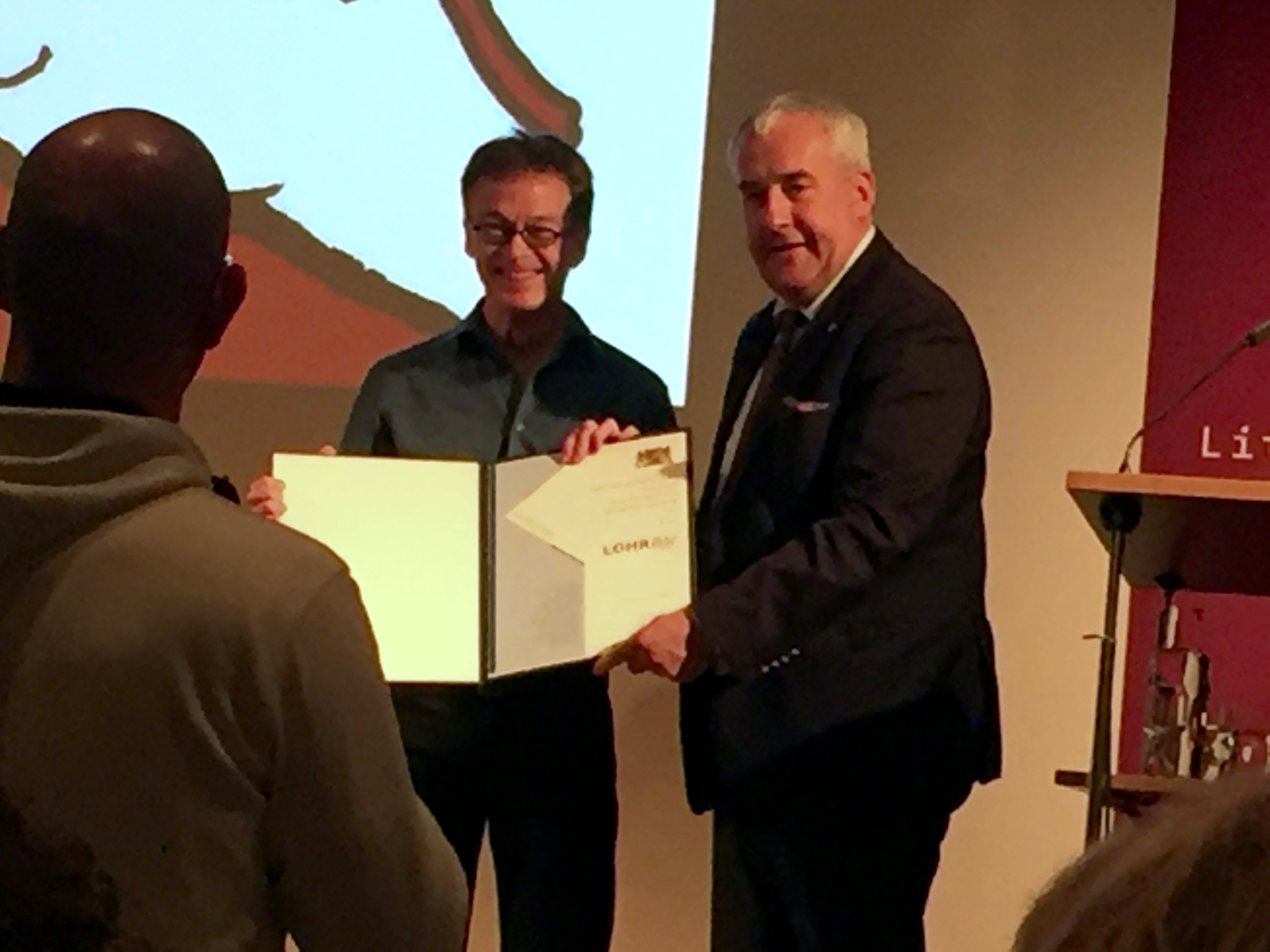 Der Bayerische Staatsminister für Bildung und Kultus, Wissenschaft und Kunst Dr. Ludwig Spaenle zeichnet Dieter Lohr (rechts) vom LOhrBär-Verlag mit dem Bayerischen Kleinverlagspreis 2016 aus.